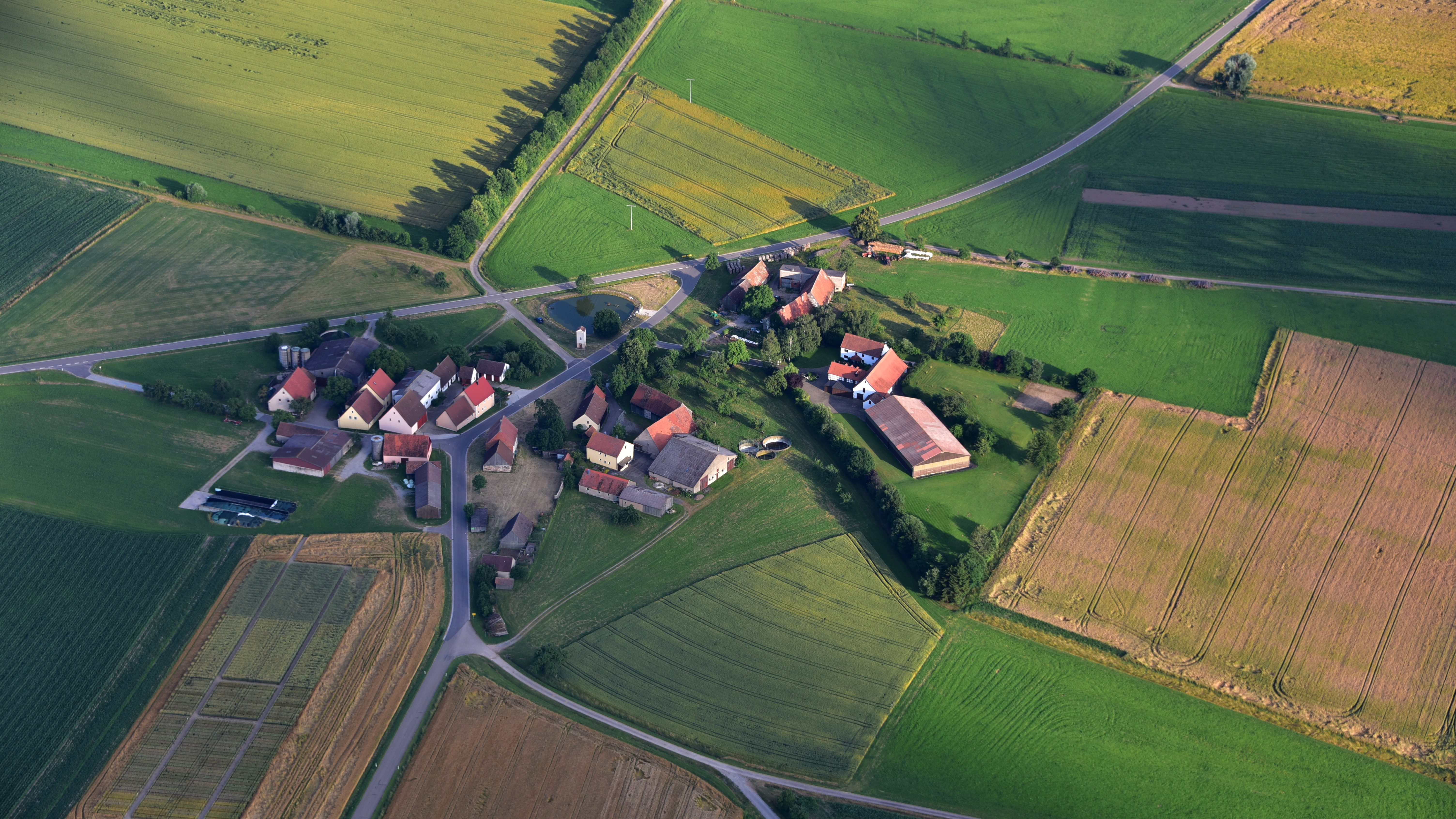 Reinswinden, Luftaufnahme (2016)